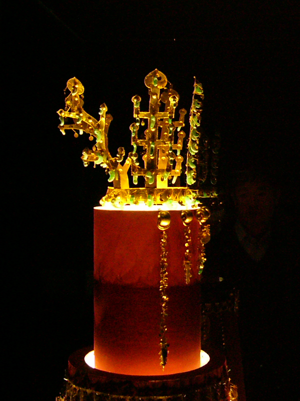 대한민국 서울 국립중앙박물관에 전시 중인 국보 제 191호 중 황남대총 북분 출토 금관의 모습. 삼국시대 신라에서 만들어졌으며, 경주시 황남동 미추왕릉 지구의 황남대총에서 출토되었다. 원소유권은 경주국립박물관에 귀속된다. This crown is made in the Old Silla period and and was excavated from Hwangnam-Daechong Tomb in Gyeongju, Gyeongsang Province. It is the 191st National Treasure of South Korea and is currently exhibited at National Museum of Korea in Seoul. However, Gyeongju National Museum has the ownership of it. This image is a cropped version of the original picture.